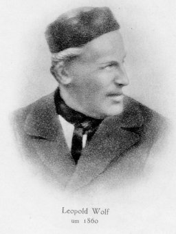 Leopold Wolf, Inhaber des Unternehmens Leopold Wolf’s Söhne